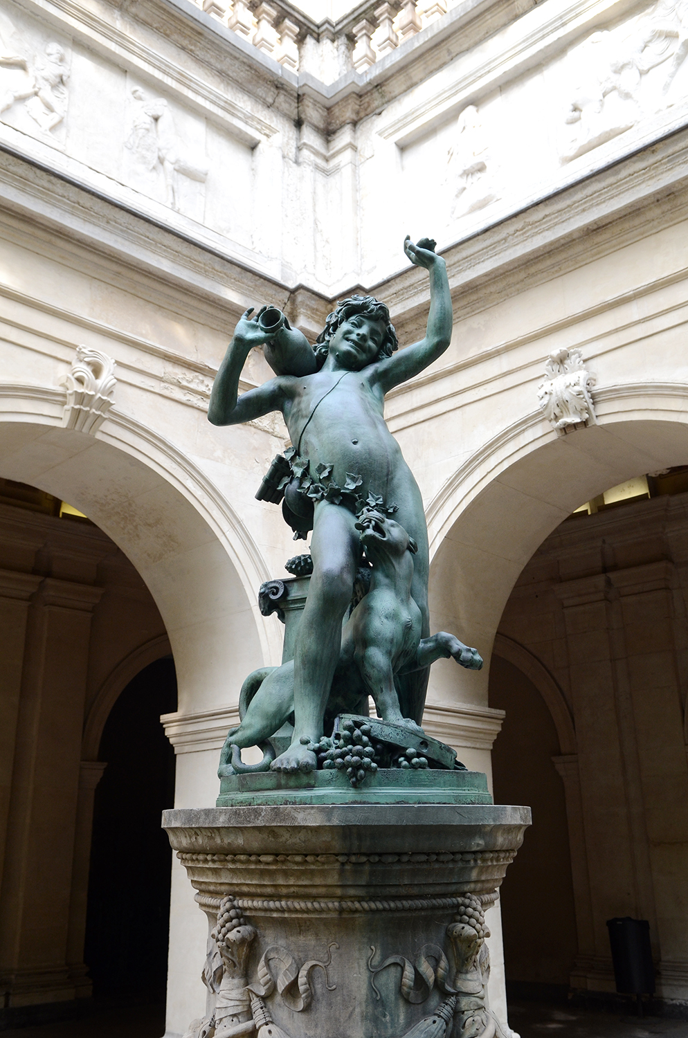 Faune ivre (1863), Louis-Léon Cugnot, signé daté, fondu par Thiébaut frères Louis-Léon Cugnot (Paris 1835, Paris 1894) obtint le Prix de Rome en 1859, conjointement avec Alexandre Falguière. Il a été pensionnaire de la Villa Médicis à Rome de 1860 à 1863. Ce Jeune faune ivre est sont dernier envoi de Rome. L’œuvre a été exposée aux Salons de 1864 et de 1870, puis acquise par la ville de Lyon cette même année. L’œuvre représente un jeune faune titubant au retour d’une fête de Bacchus (dieu romain du vin et de l’ivresse), accompagné par une panthère. Le jeune âge du personnage et sa « vulgarité » lui ont beaucoup été reprochés.